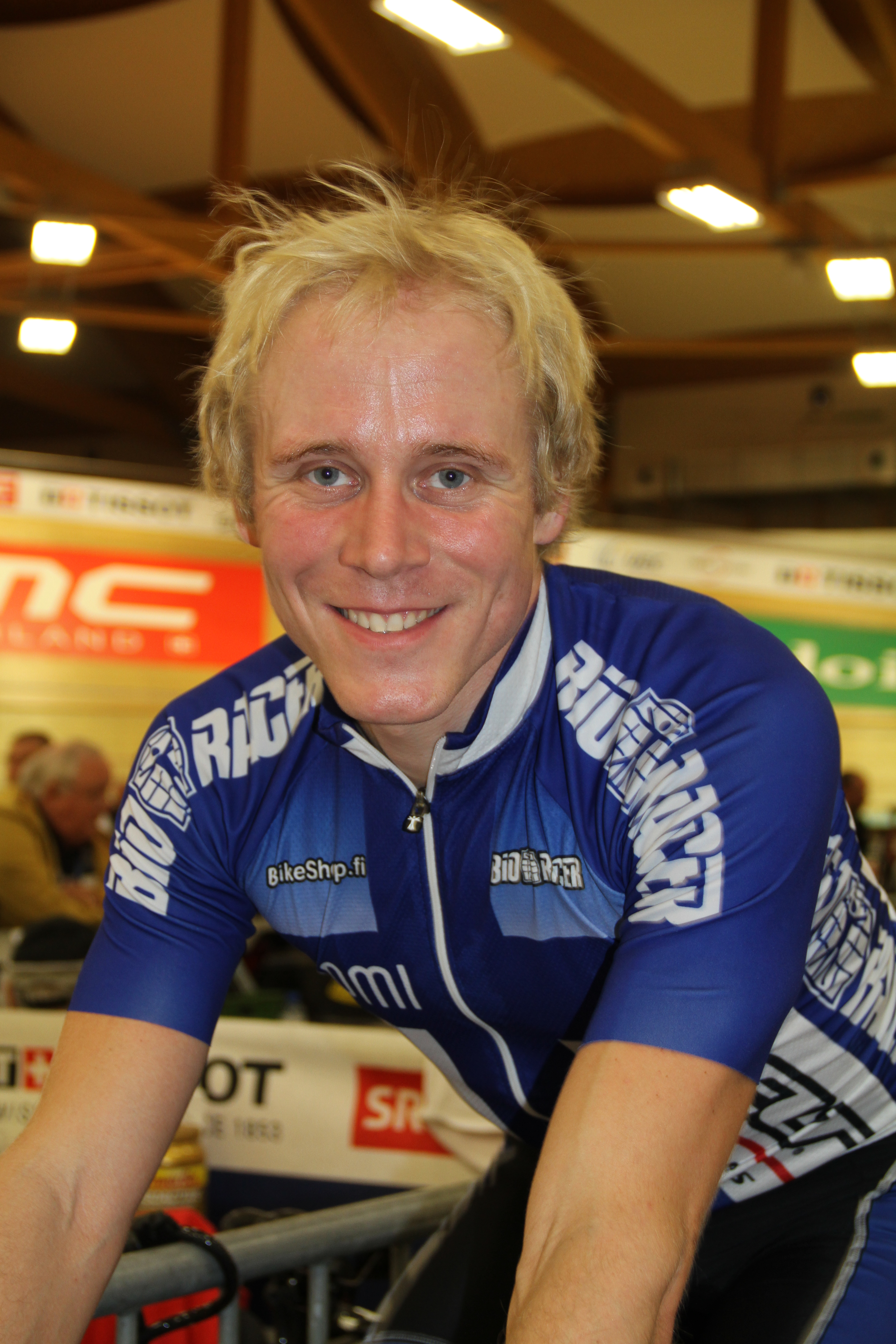 Mika Simola, finnischer Radsportler The making of this document was supported by the Community-Budget of Wikimedia Germany.